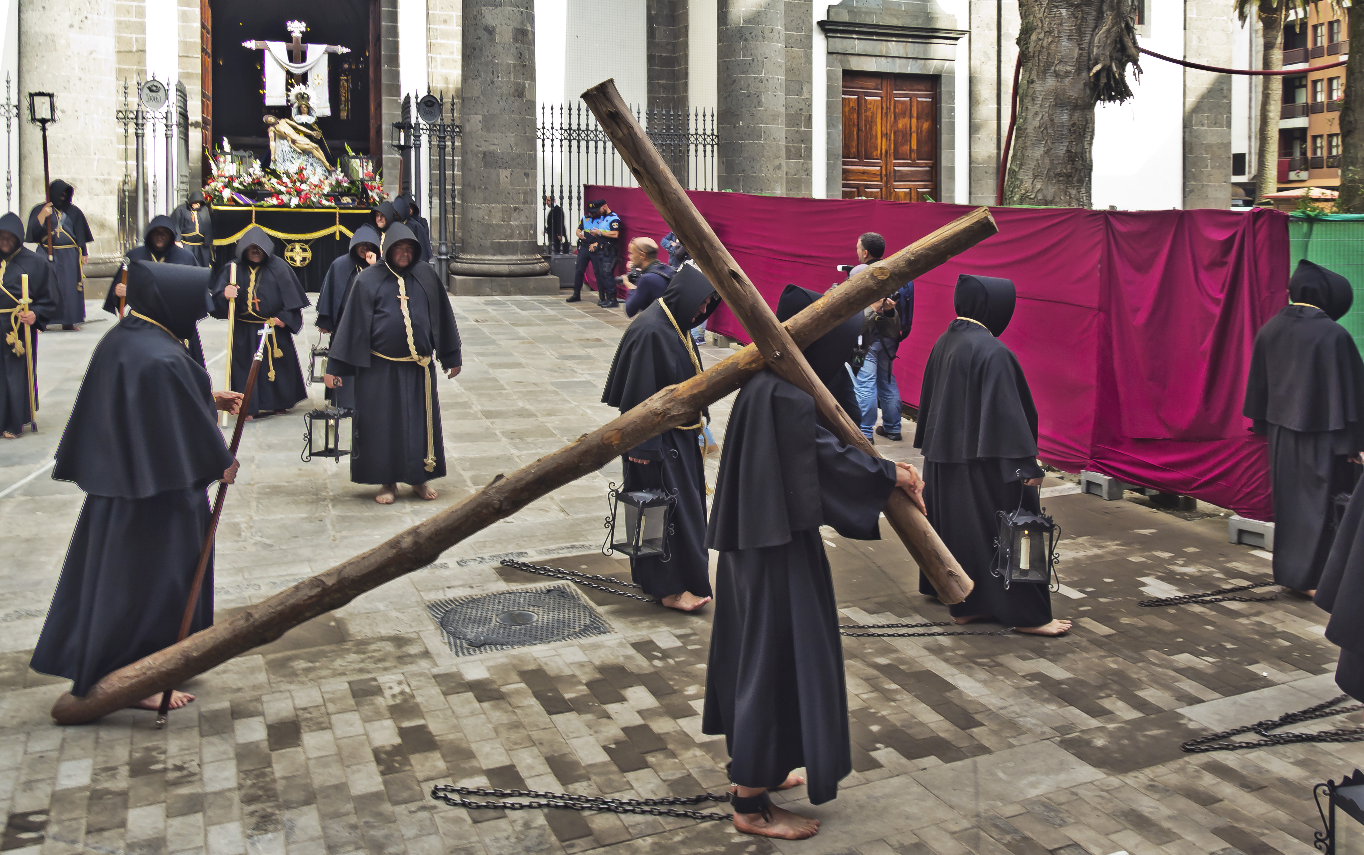 Cofradía del Lignum Crucis y La Piedad